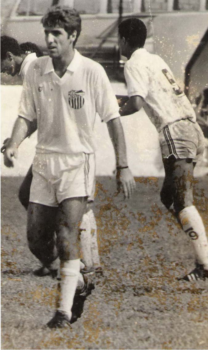 Anderson Florentino atuando no Clube São Cristóvão de Futebol e Regatas